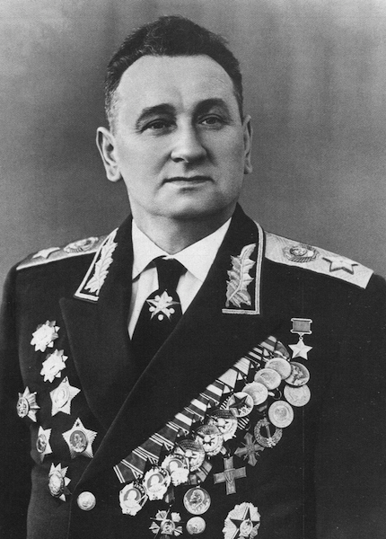 Маршал Советского Союза Гречко Андрей Антонович в парадном мундире. 1960 г.